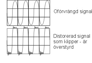 Visar schematiskt en signal som klipper. Egen ritad bild.